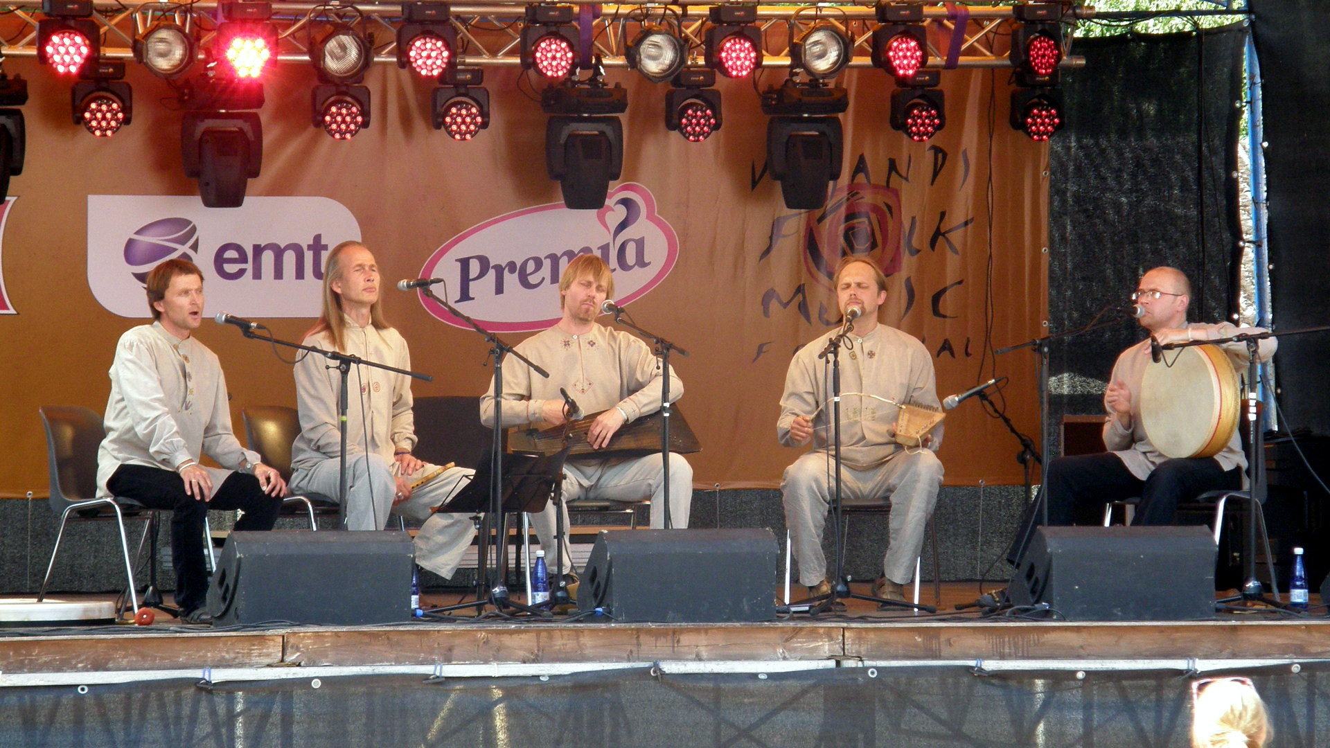 ansambel Triskele Viljandi folkloorifestivalil